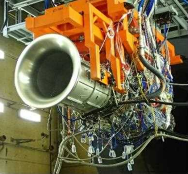 ベルマウスを着けて試験中のXF9-1